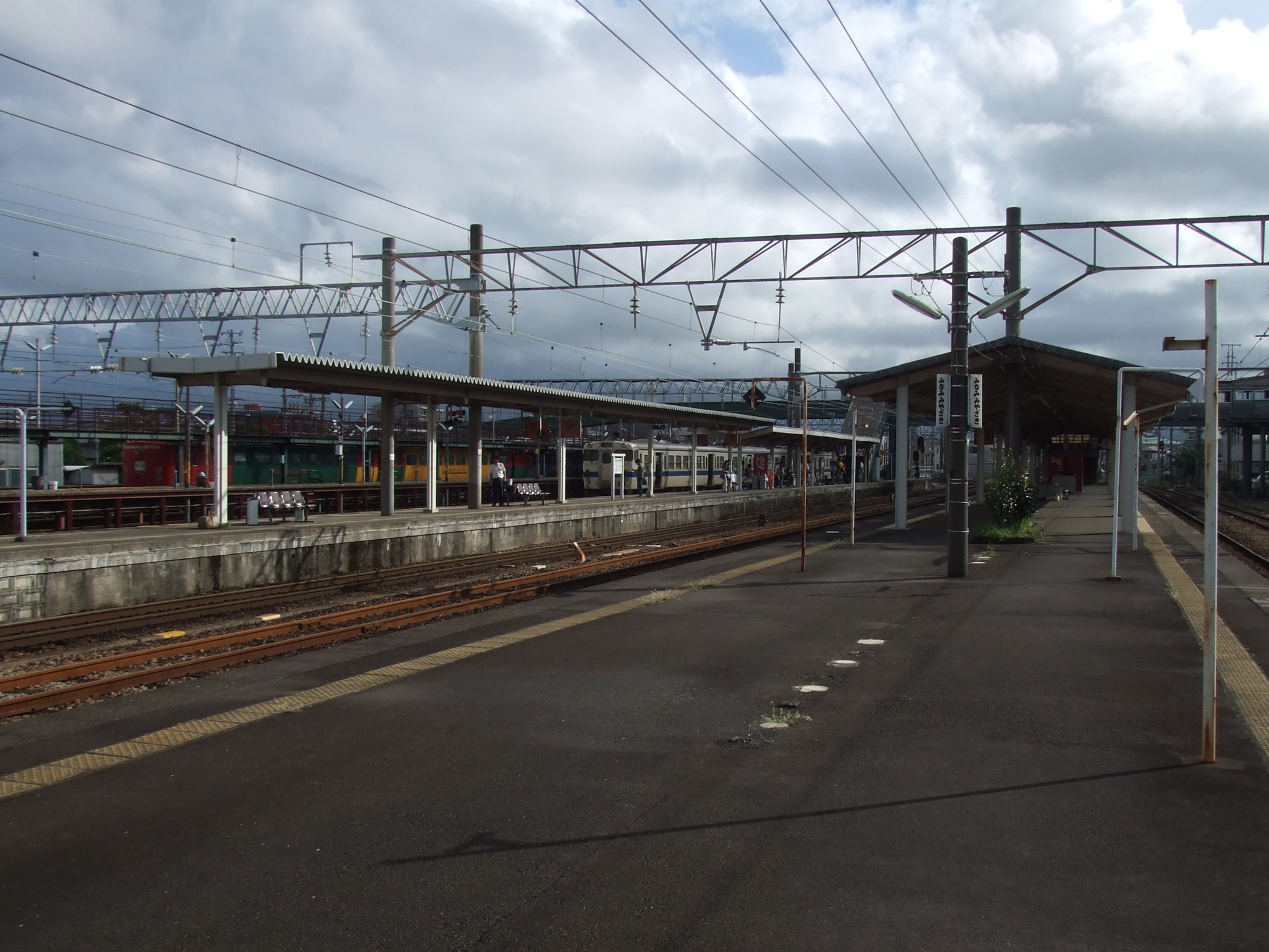 南宮崎駅 ホームの様子